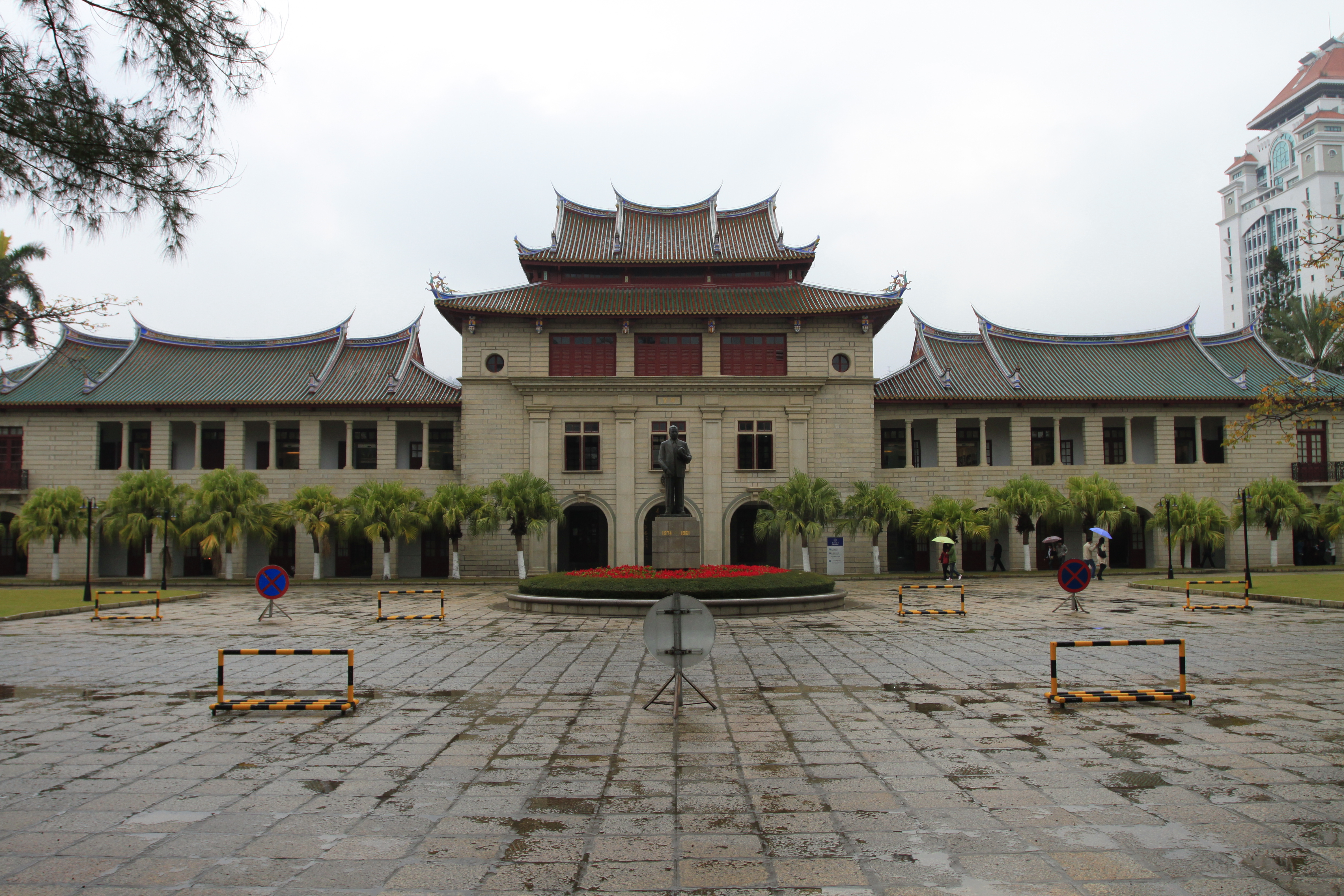 厦门大学群贤楼